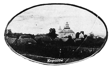 Церква Преображення Господнього (1753) в селі Купичів Турійського району Волинської області.